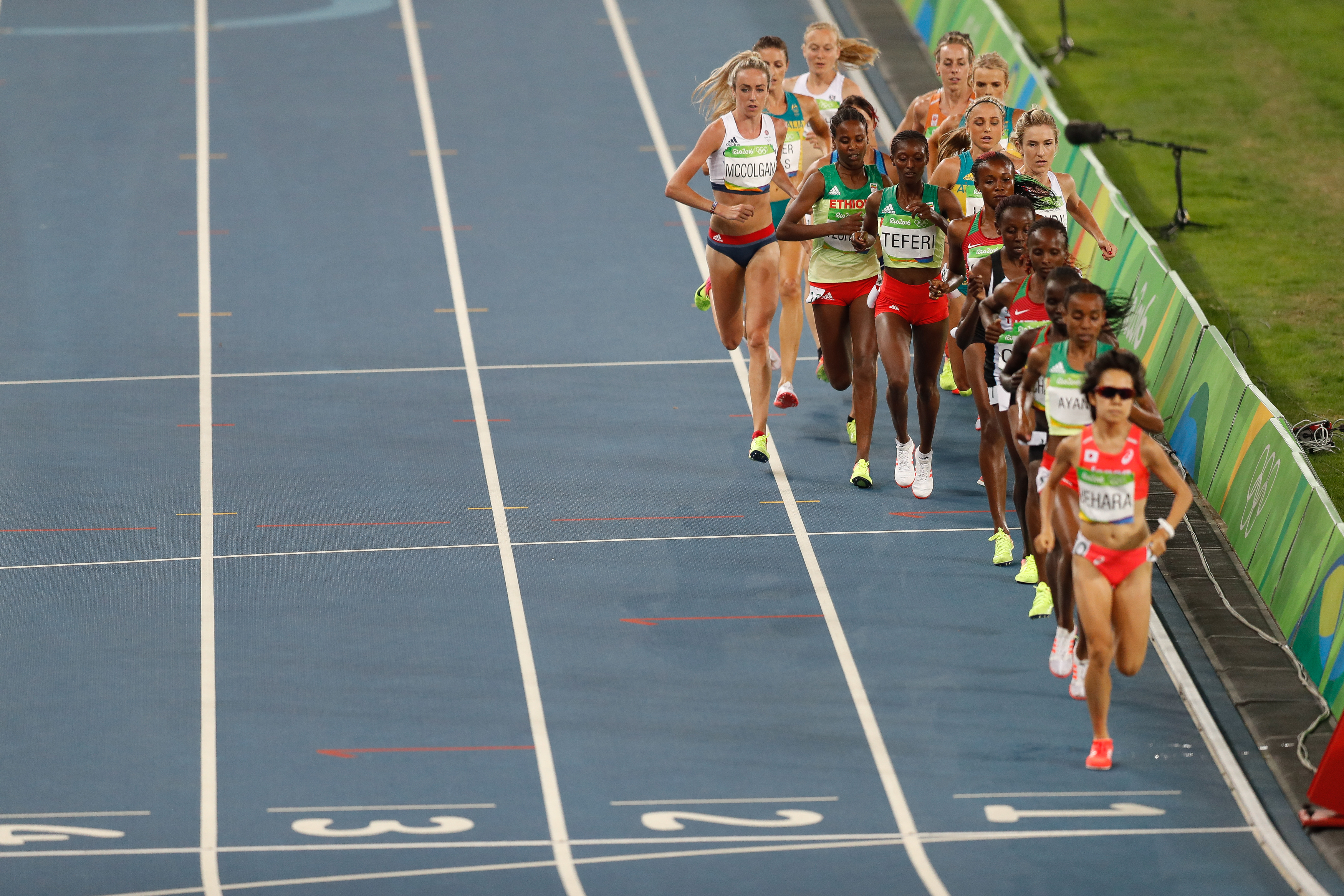 Rio de Janeiro - A queniana Vivian Jepkemoi Cheruiyot vence final e bate recorde olímpico dos 5 mil metros nos Jogos Rio 2016, no Estádio Olímpico (Fernando Frazão/Agência Brasil)